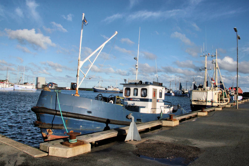 Part of Strandby havn in Denmark. Photo taken by Jørgen Larsen, 2006-11-12.